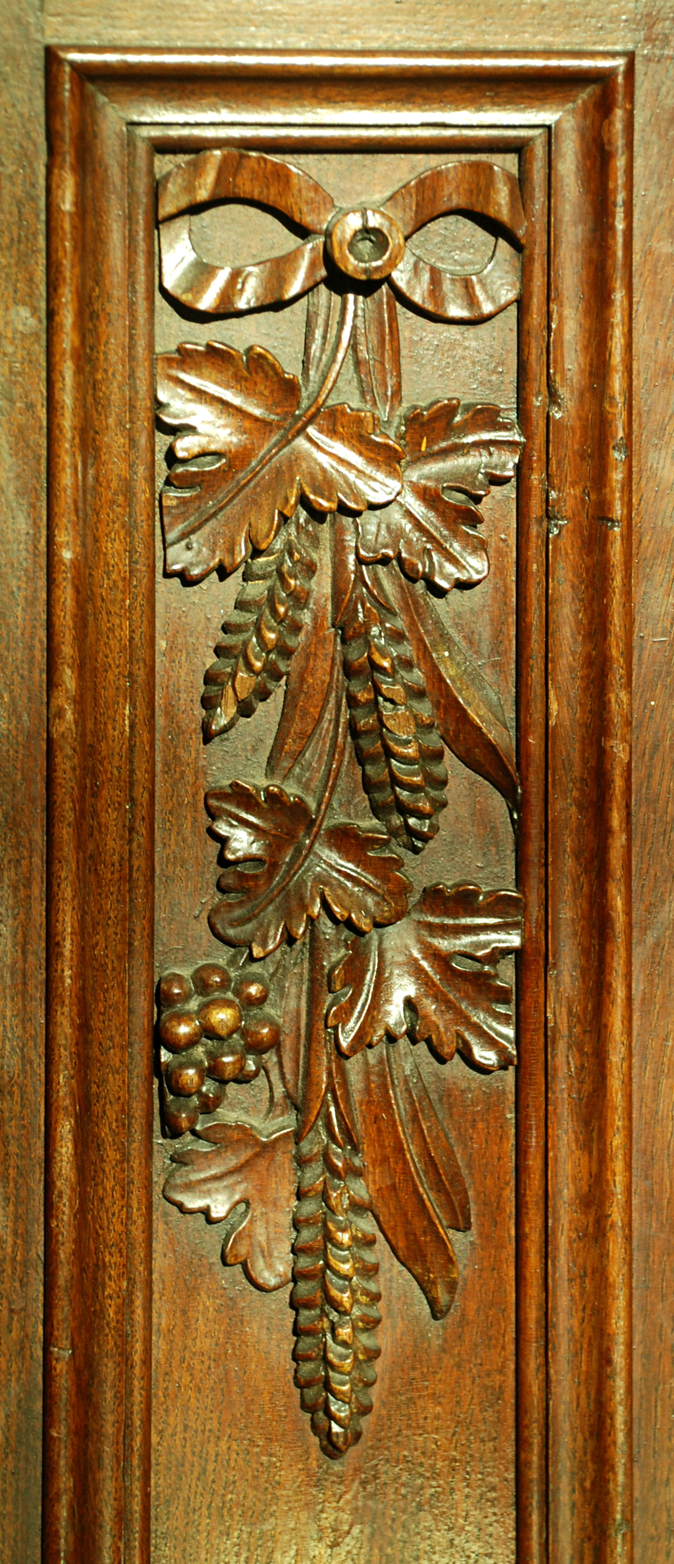 Belgique - Brabant wallon - Église de Court-Saint-Étienne